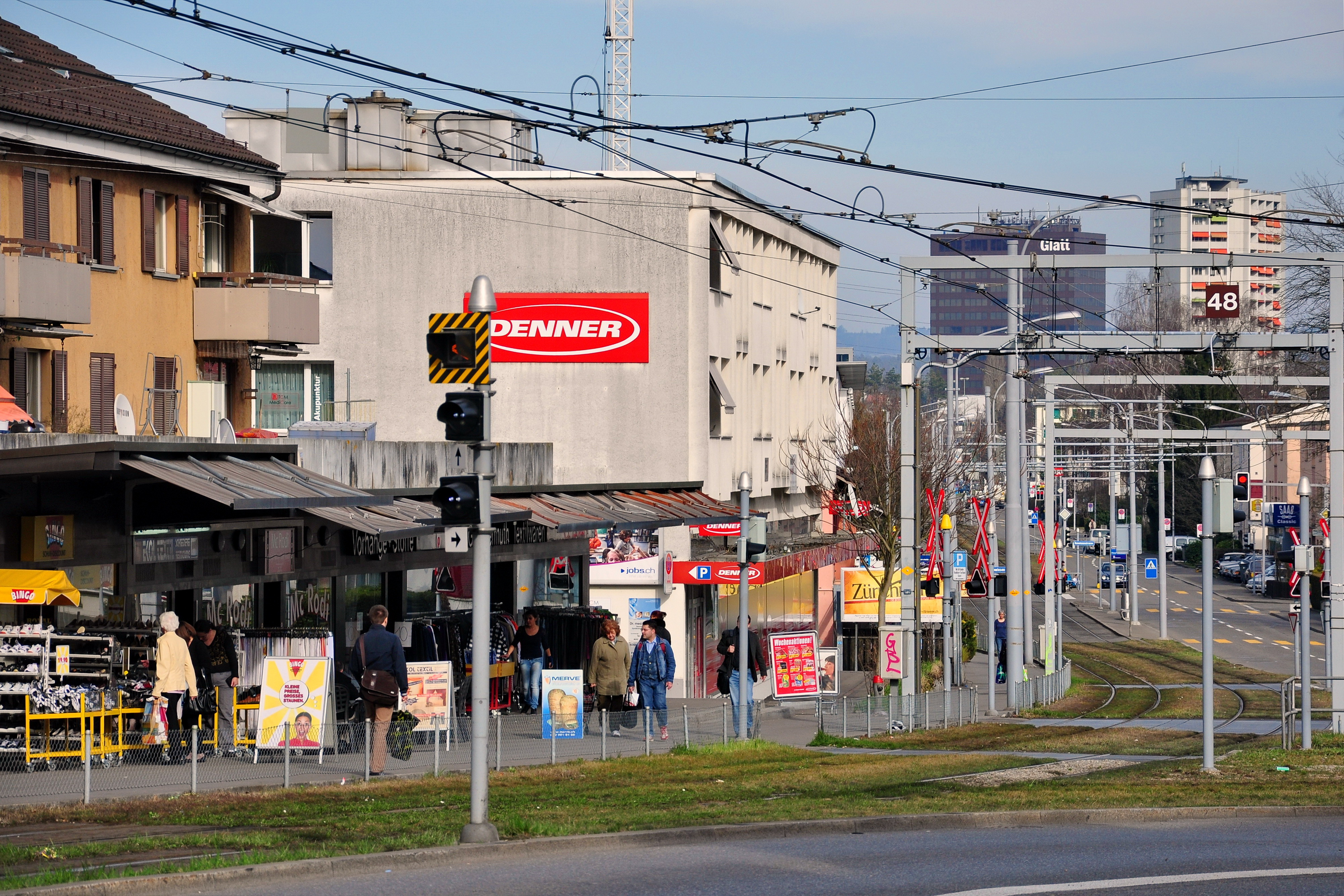 Winterthurerstrasse in Zürich-Schwamendingen (Switzerland), as seen from Schwamendingerplatz, Glattzentrum in the background.